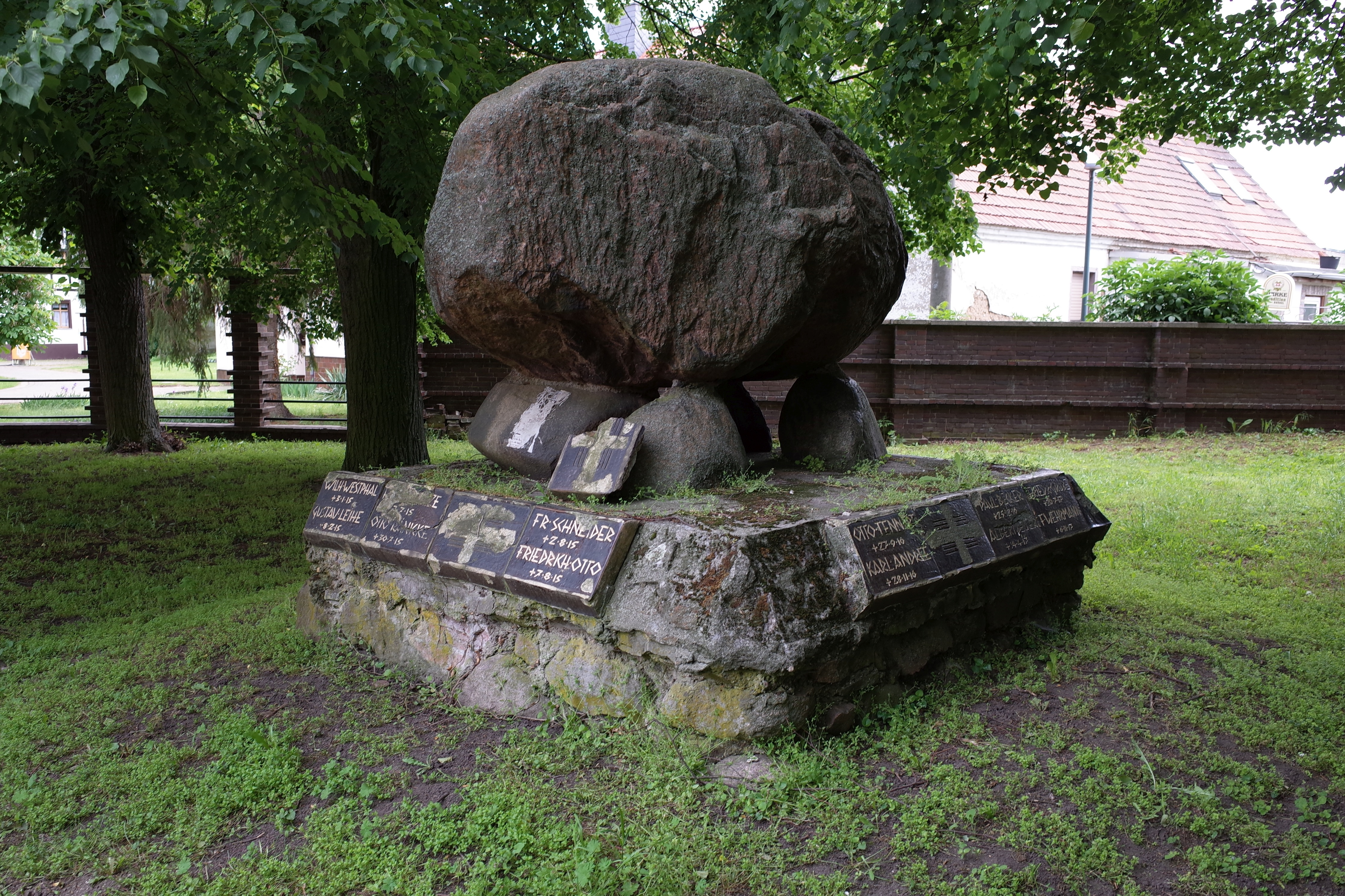 Micheln, Kriegerdenkmal an der Evangelische Kirche St. Nicolai.